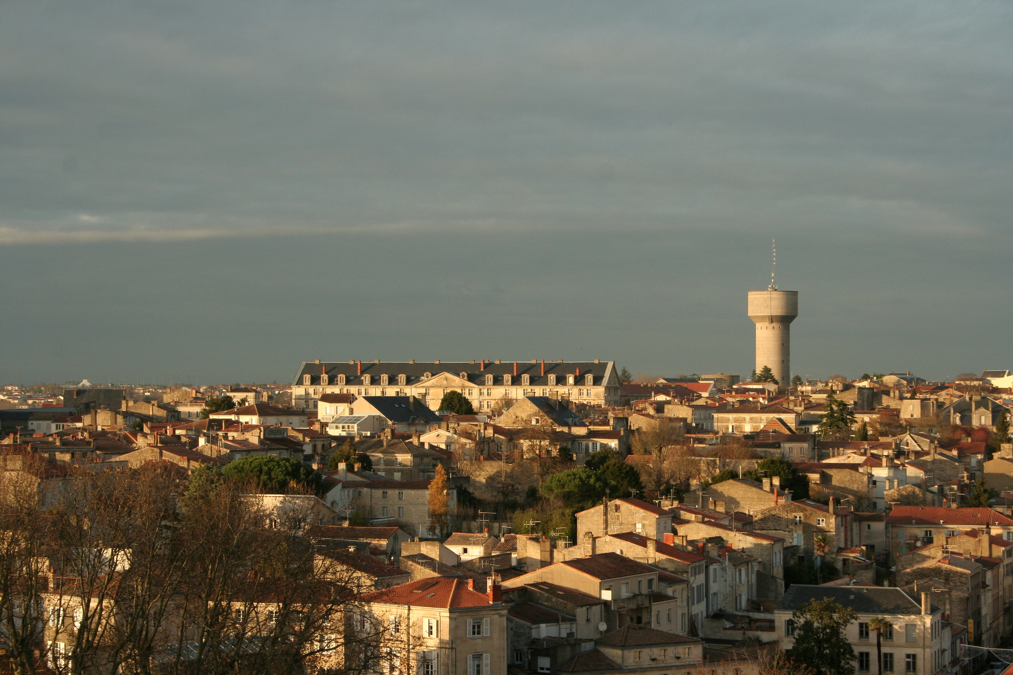 Caserne Du Guesclin vue de la grande roue de la place de la Brêche